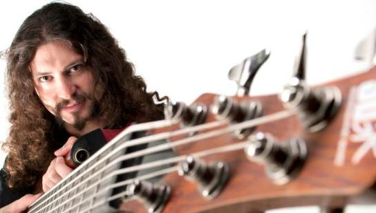 Mauricio Nader. Bajista Chileno